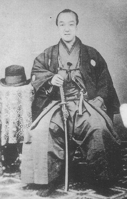 松平頼聡または松平頼聰 Matudaira Yoritoshi.名刺判写真。